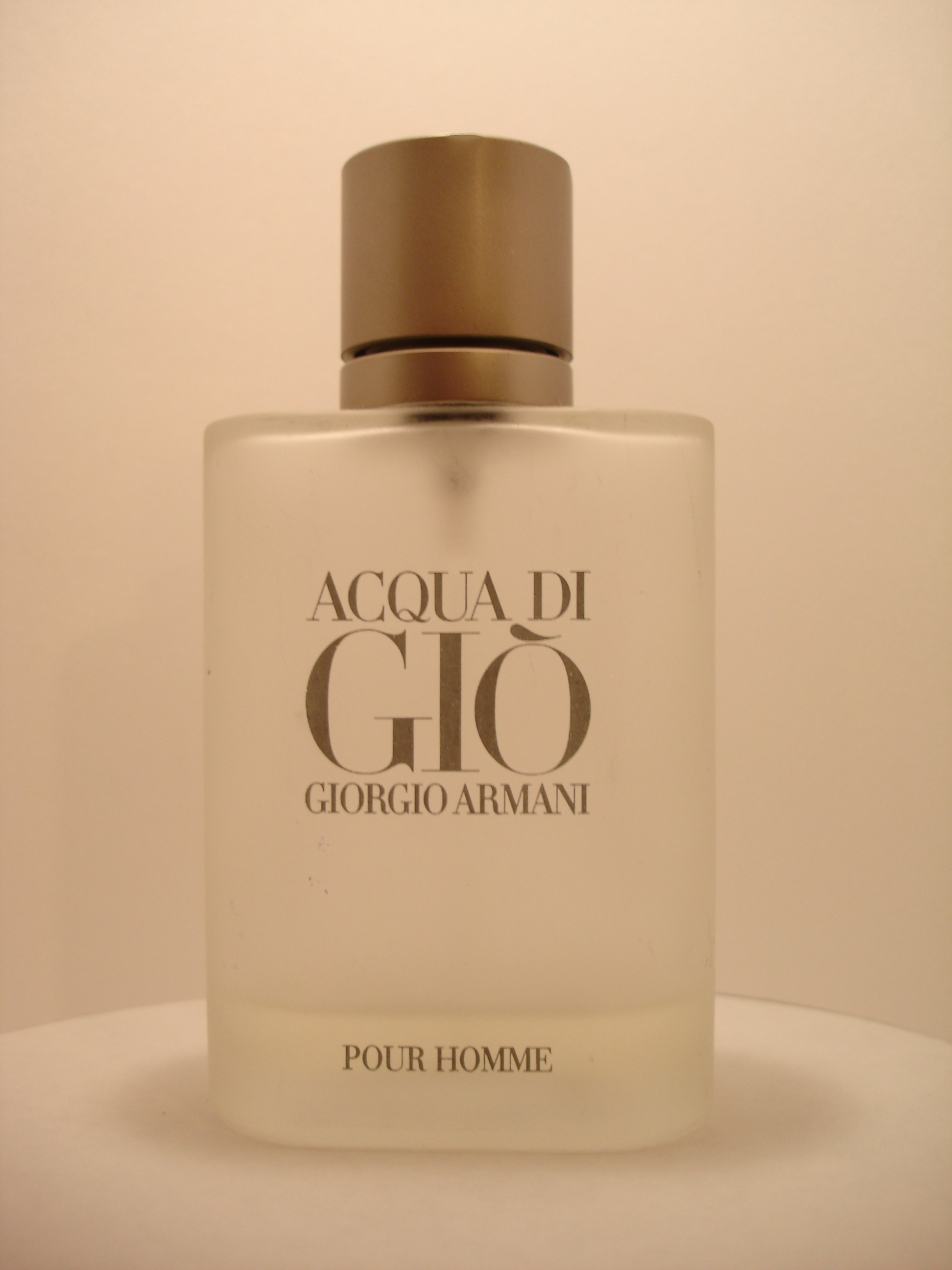 Frasco de perfume de Armani, Acqua Di Gio.